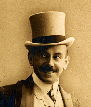 Der Humorist Robert Steidl, Ausschnitt aus einer Künstlerpostkarte, welche er 1910 selbst versendete